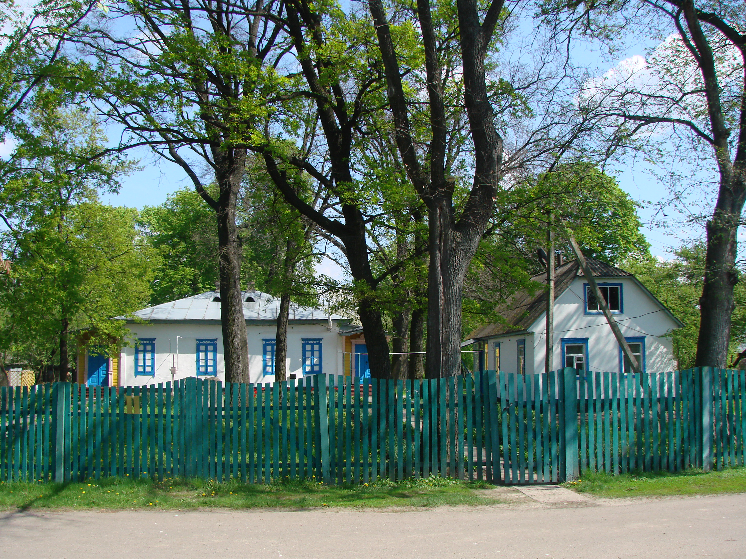 Будинок в якому жив і працював народний художник О. Ф. Саєнко (1899–1985рр.) та флігель, де жила Ганна Барвінок (Білозерська-Куліш) — українська письменниця, Борзна, вул. Партизанська, 58